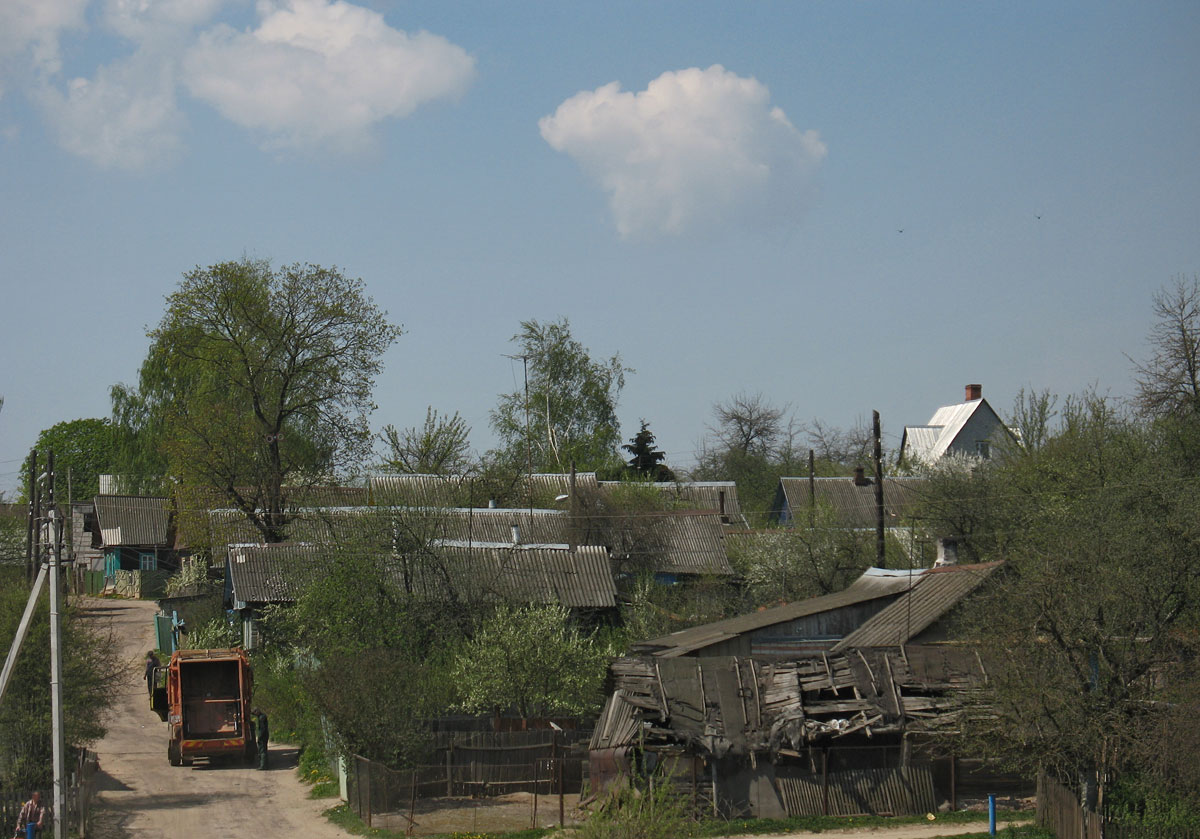 Former Rylaŭščyna village in Miensk